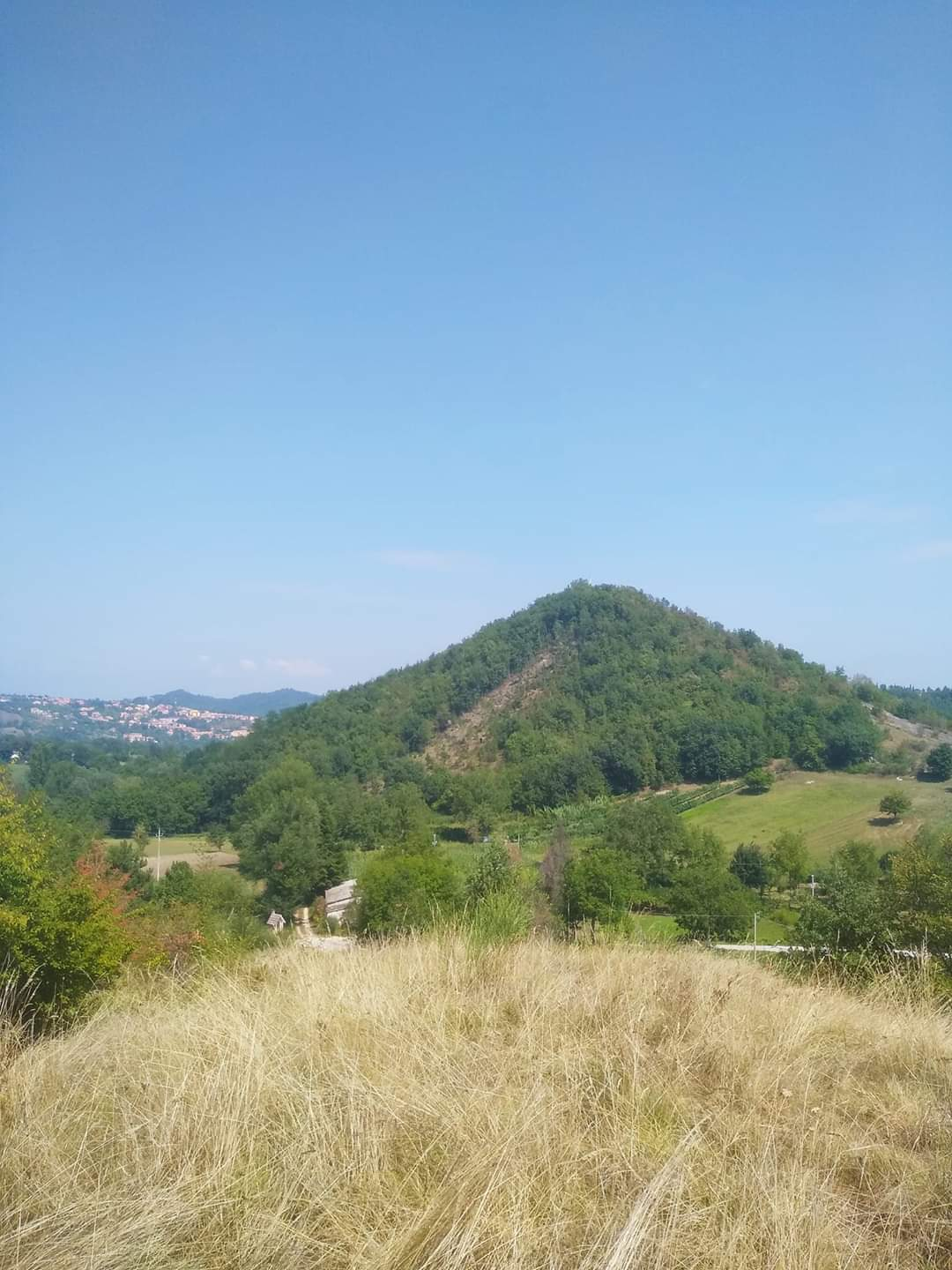 Monte Castelvecchio